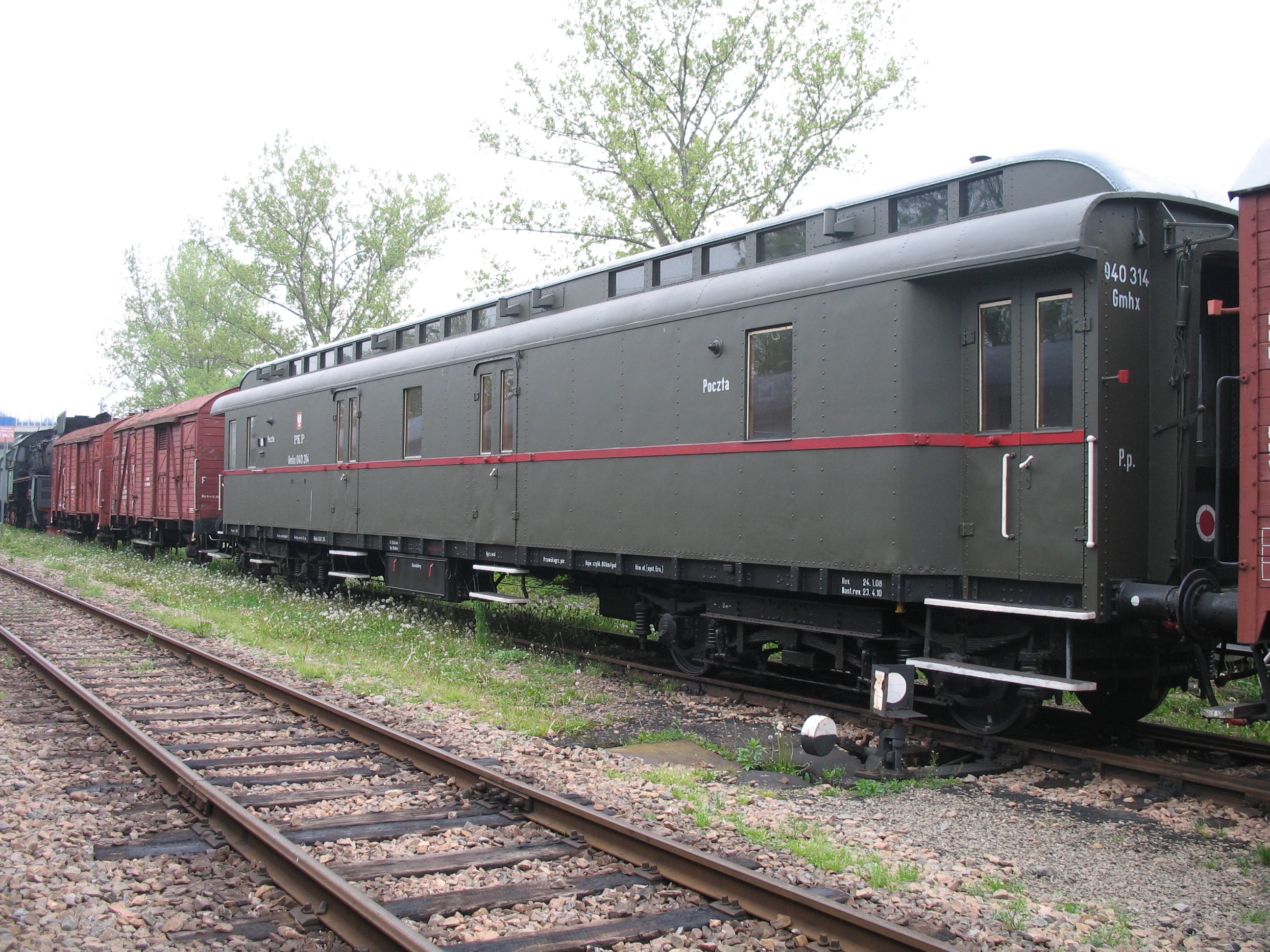 Wagon pocztowy typu Gmhx numer 040 314. Zbudowany w 1930 roku. W 1993 roku przebudowany na wagon restauracyjny. Eksponat skansenu taboru kolejowego w Chabówce